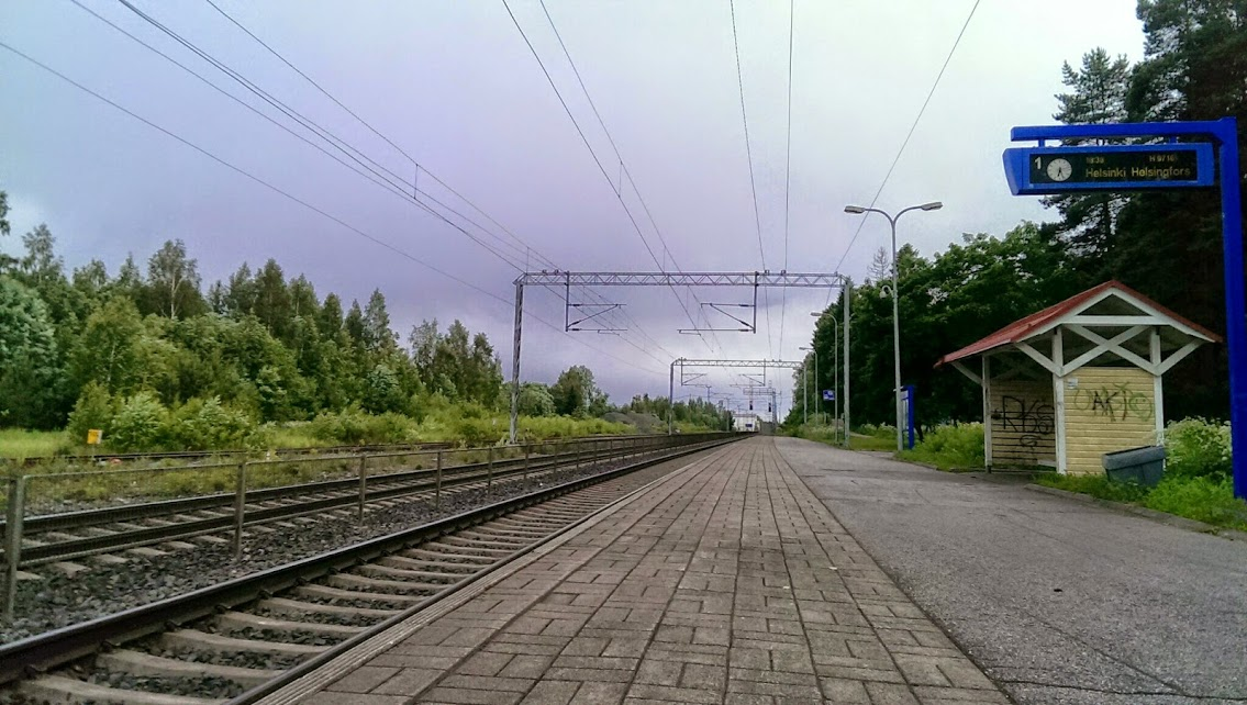 Ryttlän juna-asema (seisake)